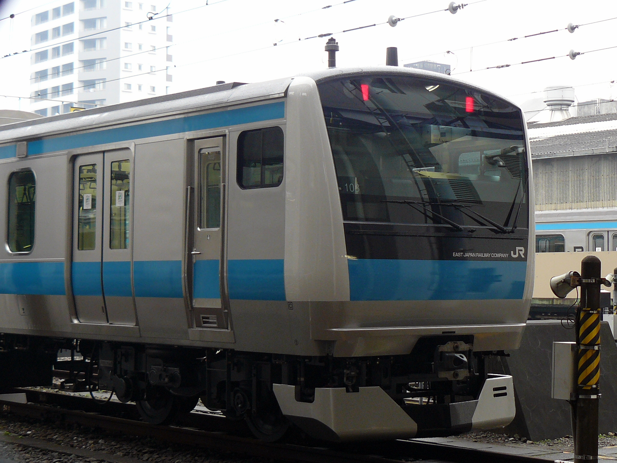 自身が下十条運転区で撮影しました。